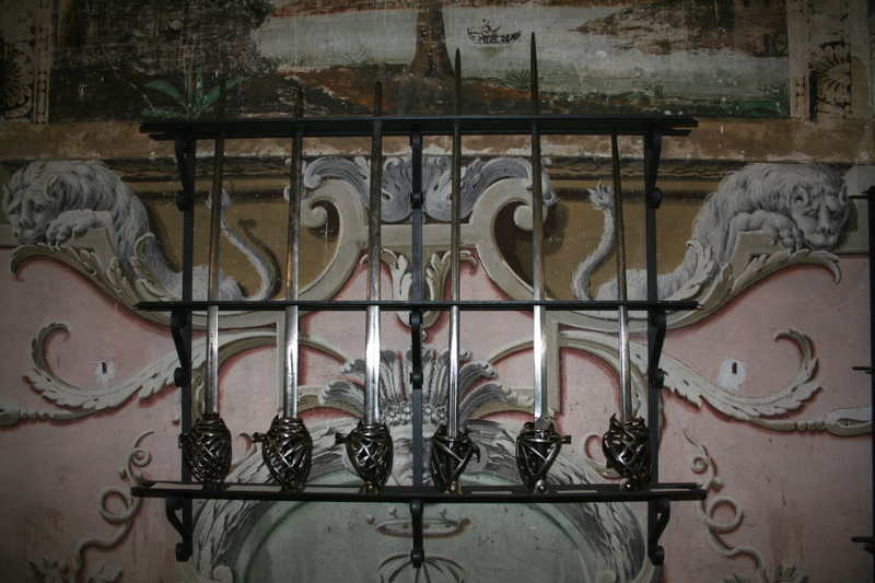 Serie di spade, XVII e XVIII sec., Palazzo Duranti-Marzoli, Palazzolo sull'Oglio.